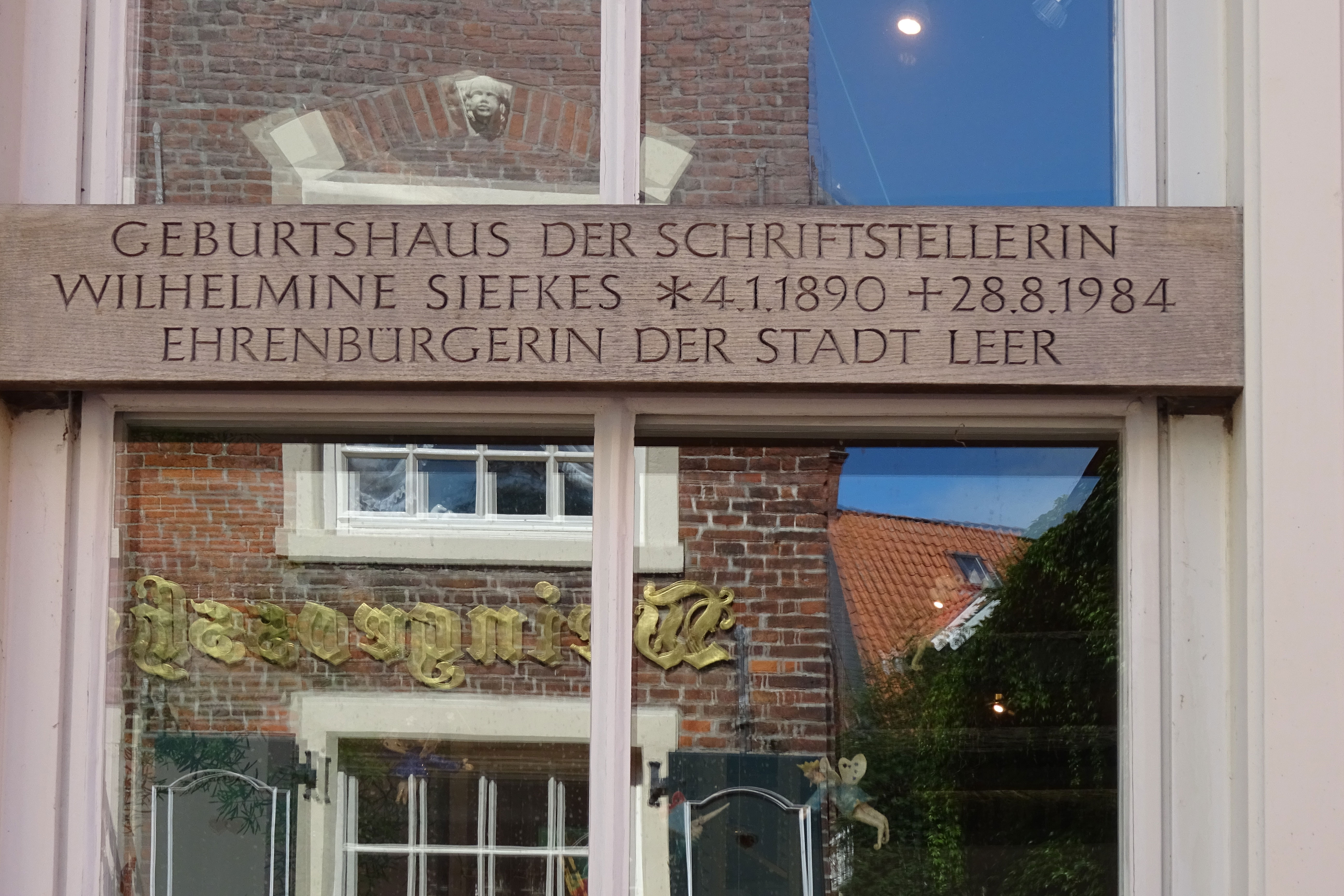 Opschrift geboortehuis Wilhelmine Siefkes in de Rathausstraße 9 in Leer (Ostfriesland)